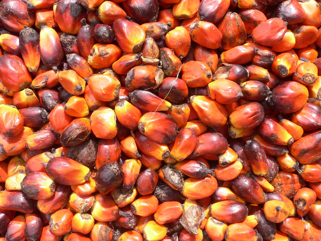 Palm nuts in volumn